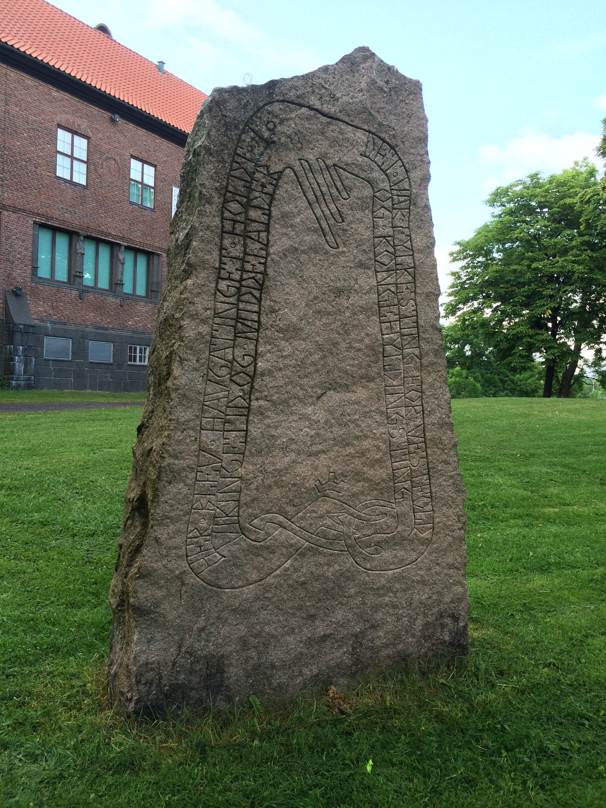 Haugar Vestfold Kunstmuseum i juni 2014. Bygningen ble bygd 1918–1921 som Tønsberg navigasjonsskole (Tønsberg sjømandsskole) på Haugar/Møllebakken i Tønsberg i Vestfold. Arkitekter: Andreas Bjercke og Georg Eliassen. Utsmykning: Tolv karyatider av Wilhelm Rasmussen 1920-1922. Minnebauta over Haugarting - Haugar. A.H. Bjercke og G. Eliassen: «Her blev haugatinget holdt i vikingetid og middelalder. Det var fylkesting for Vestfold og kongehyldningsting.»